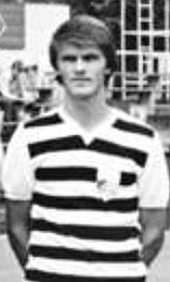 Title: Mannschaftsfoto FC Carl Zeiss Jena Factual corrections and alternative descriptions are encouraged separately from the original description. Additionally errors can be reported at this page to inform the Bundesarchiv. Original historic description: ADN-ZB-Kasper-2.9.82-zin-Bez. Gera: Fußball-UEFA-Cup-Teilnehmer der DDR vorgestellt: FC Carl Zeiss Jena. Die Mannschaft aus der Saalestadt ist einer der drei Vertreter des DFV der DDR im UEFA Cup 1982-83. Die Elf trifft in der ersten Runde am 15.9. (in Jena) und 29.9. (in Bordeaux) auf die französische Mannschaft von Girendins Bordeaux. Hintere Reihe v.l.n.r.: Stefan Meixner, Ullrich Oevermann, Jürgen Raab, Rüdiger Schnuphase, Torhüter Hans-Ullrich Grapenthin, Torhüter Thomas Runkewitz, Andreas Bielau, Norbert Kahnt, Gerhard Hoppe und Thomas Ludwig. Vordere Reihe v.l.n.r.: Mannschaftskapitän Lothar Kurbjuweit, Martin Trocha, Matthias Kaiser, konrad Weise, Andreas Krause, Jörg Burow, Uwe Pohl, Fred Steinborn und Wolfgang Schilling.